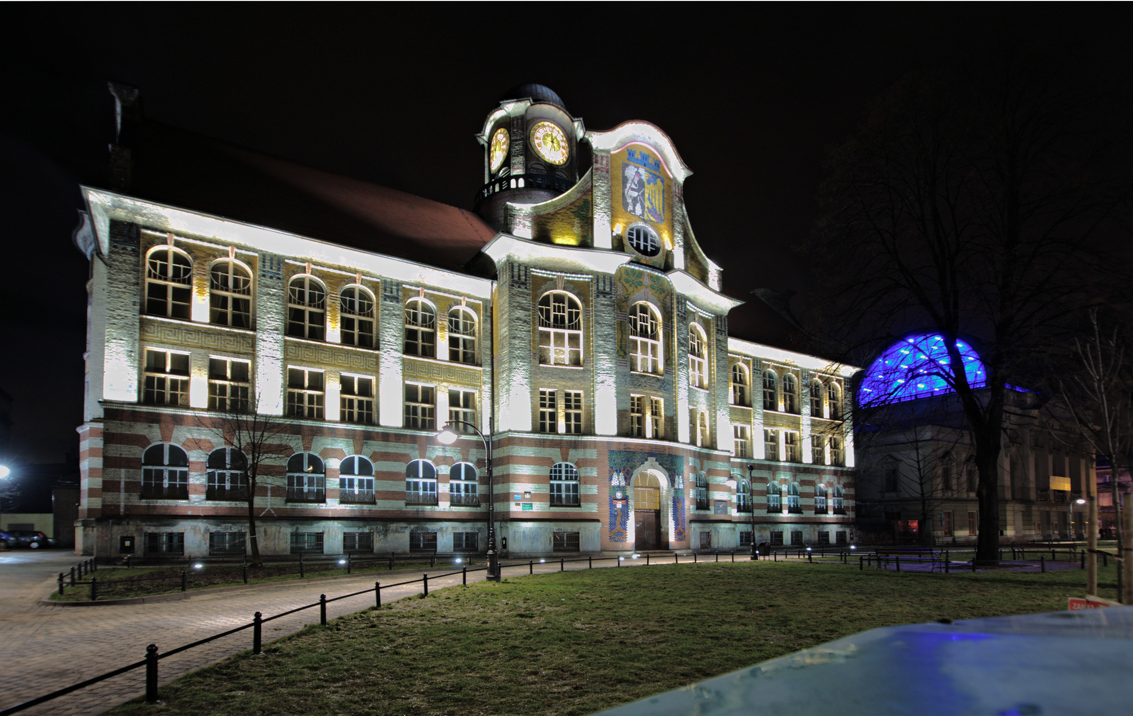 Plac Sikorskiego w Bytomiu. IV Liceum Ogólnokształcące.